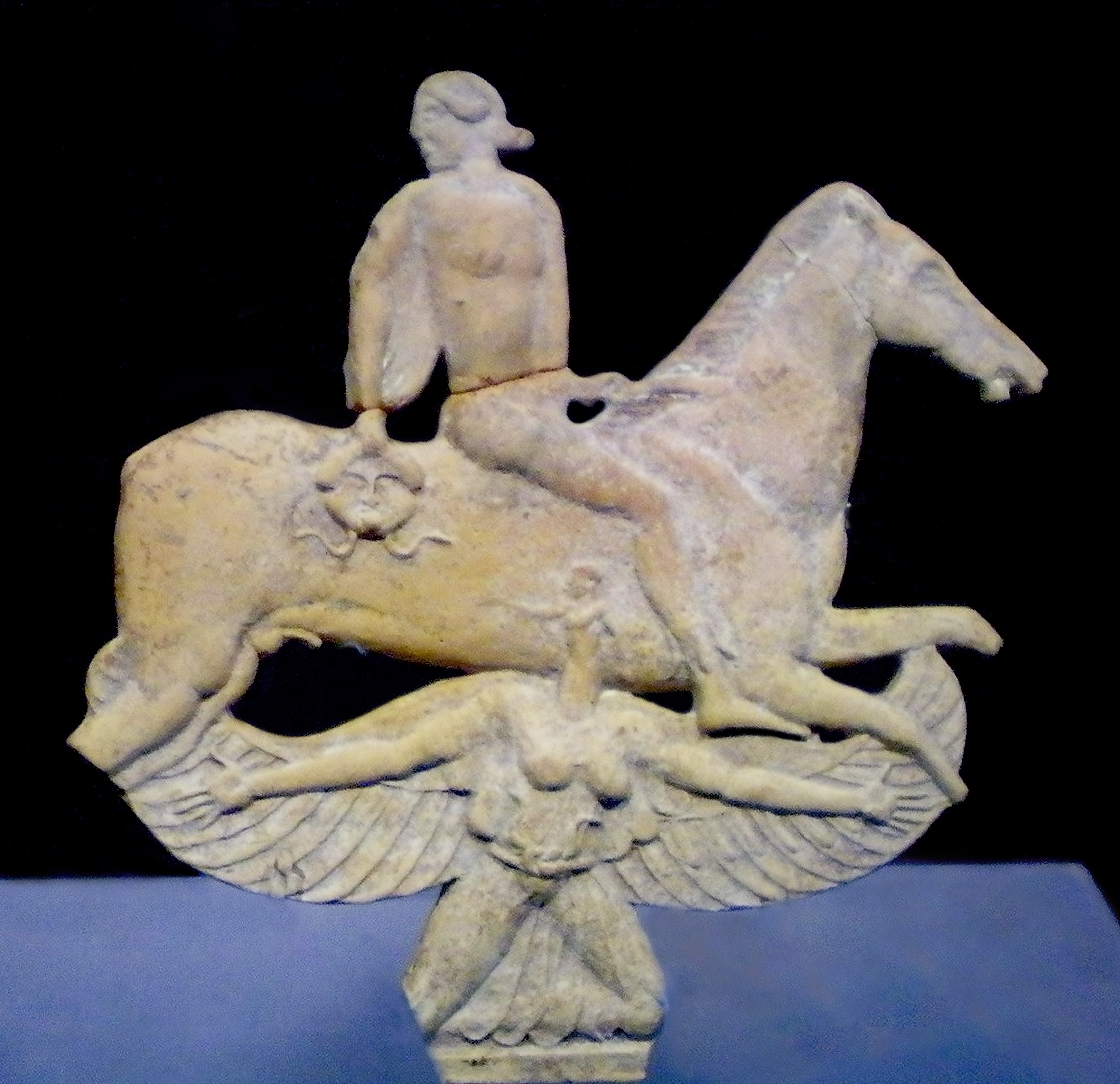 Placa de terracota en relieve que representa a Perseo sosteniendo la cabeza cortada de Medusa. Hacia el 490-470 a. C. Medidas: 170 mm x 170 mm x 8 mm. Procedente de la isla de Melos. Pertenece a la exposición La belleza del cuerpo, en el MARQ. Forma parte de la exposición permanente del Museo Británico.